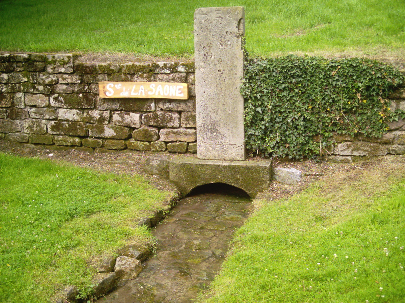 Source de la Saone à Vioménil